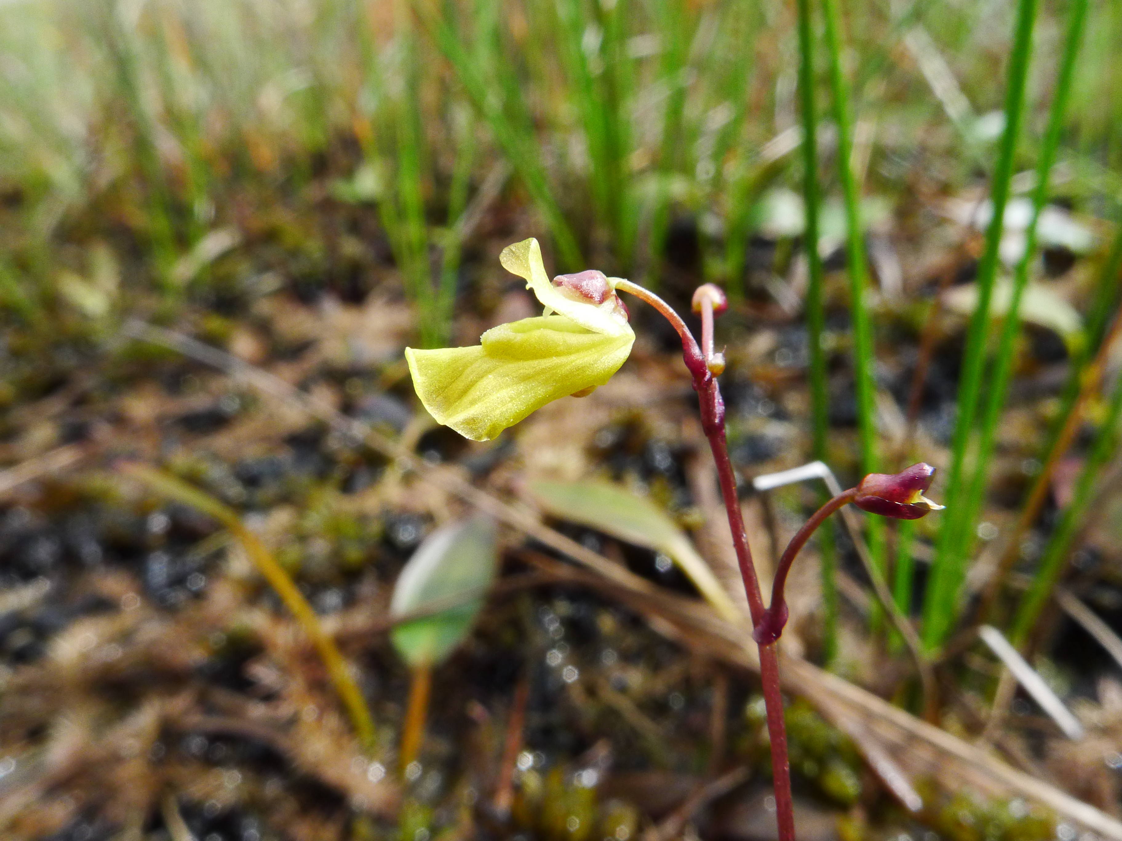 Utricularia ochroleuca